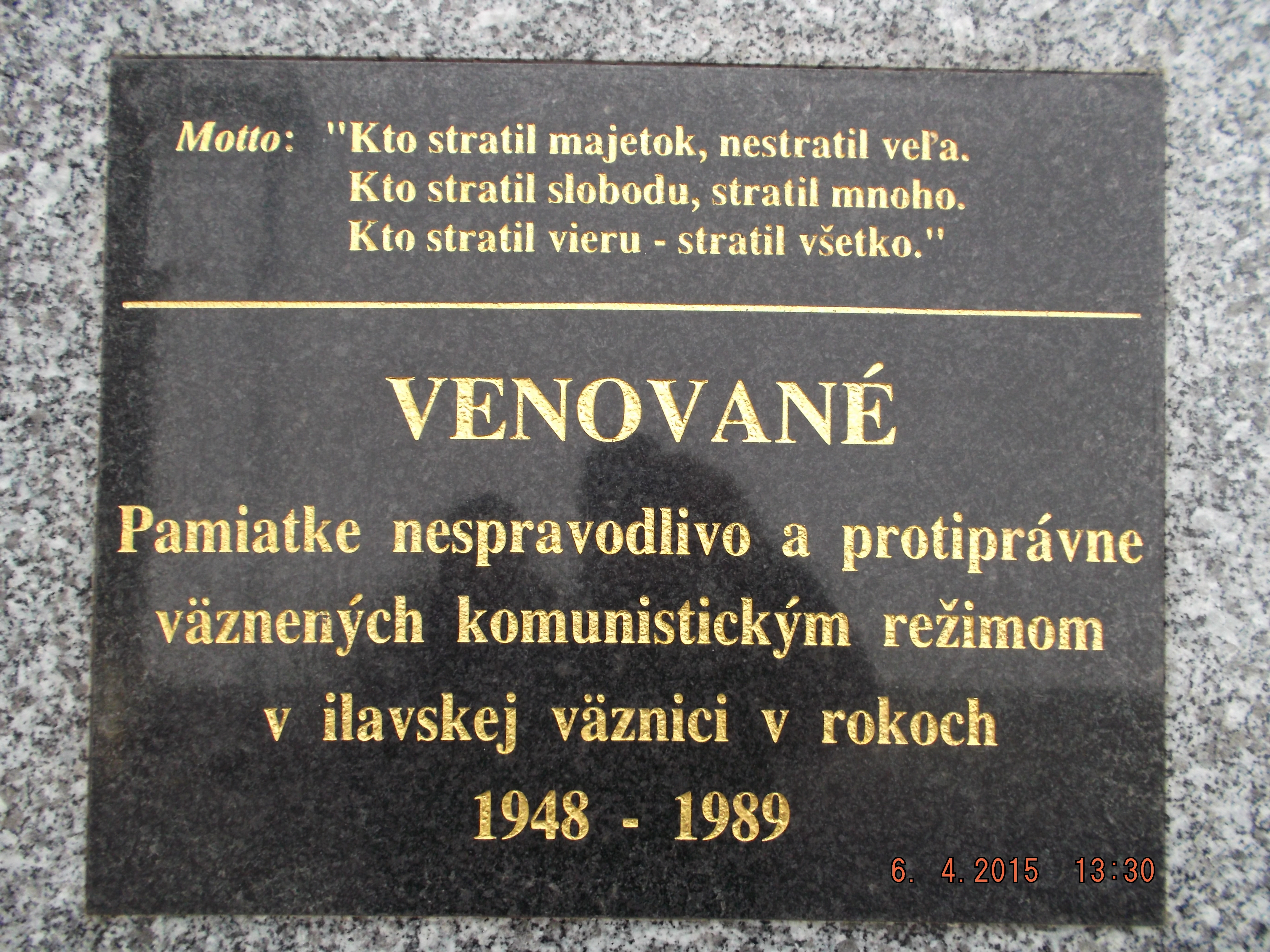 Tabuľa pamiatke nespravodlivo a protiprávne väznených komunistickým režimom v ilavskej väznici